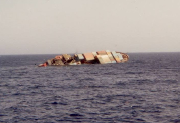 האונייה שקמה התהפכה בדרום הים האדום וטובעת בים שקט ביותר